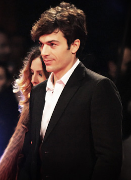 Actor Luca Argentero - Romanzo Criminale - Red Carpet